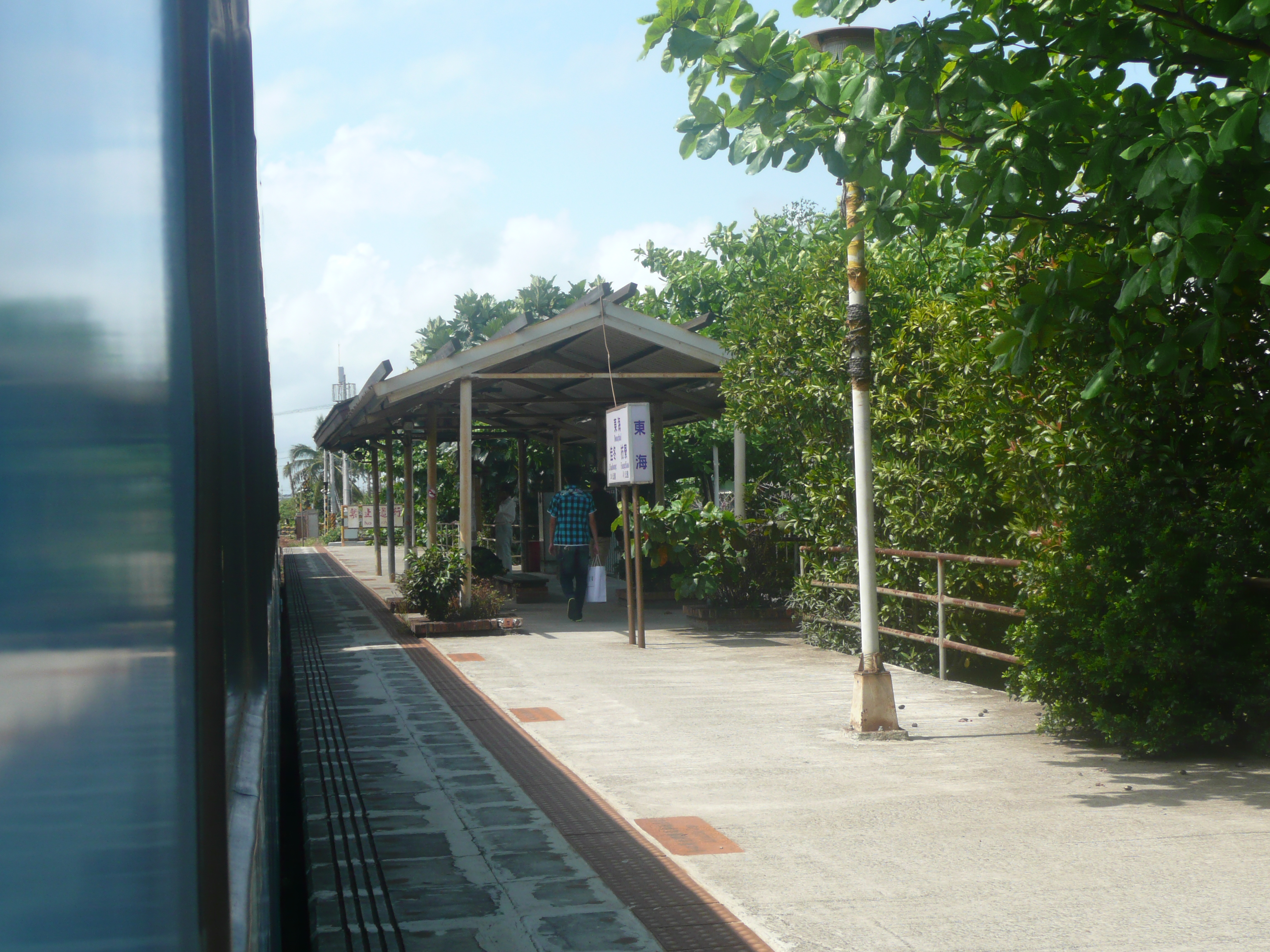 駅舎